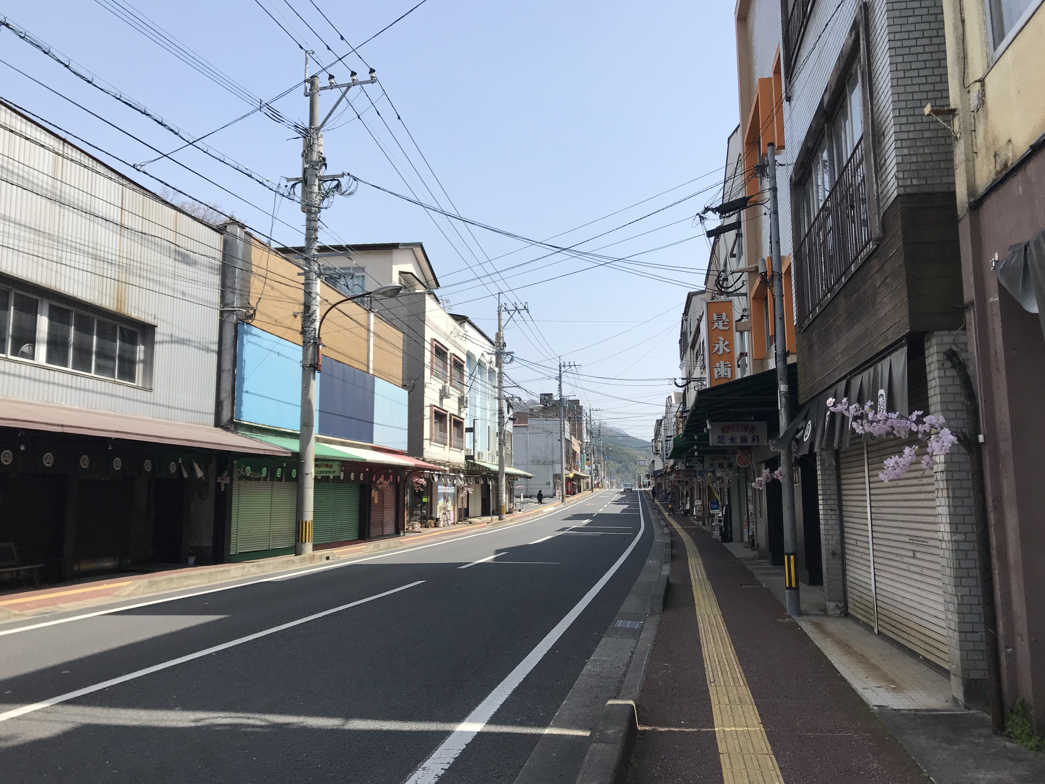 豊後森駅西側の大分県道678号